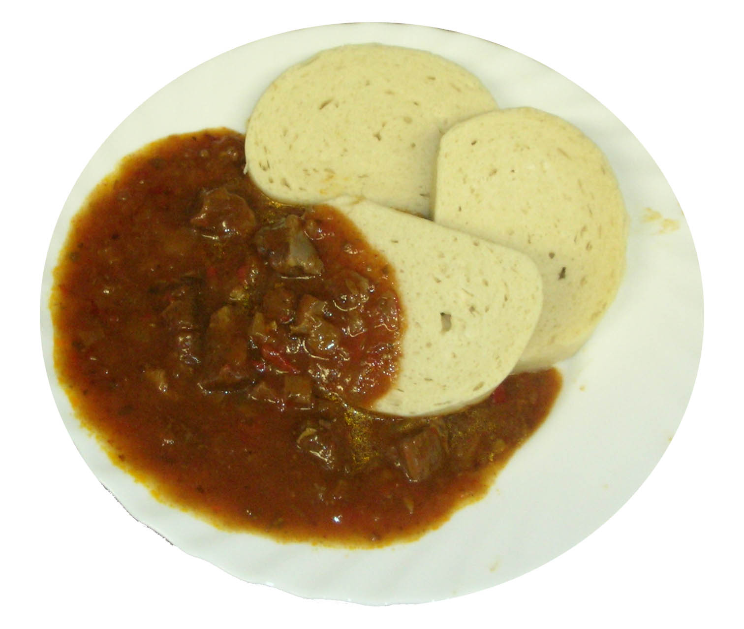 Zütsche Knödel mit Goulasch Knödel mit Goulasch